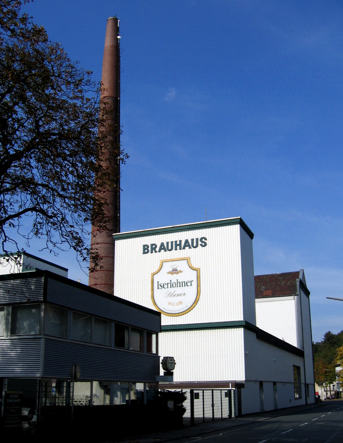 Privatbrauerei Iserlohn in Iserlohn-Obergrüne.